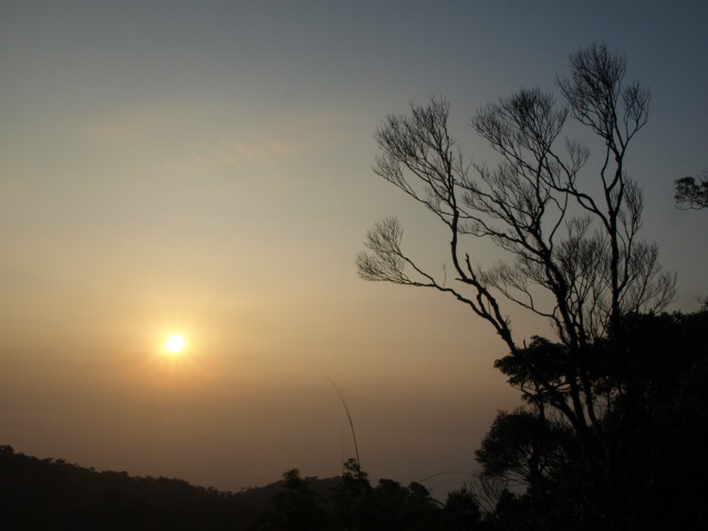 อุทยานแห่งชาติเขาคิชฌกูฏ